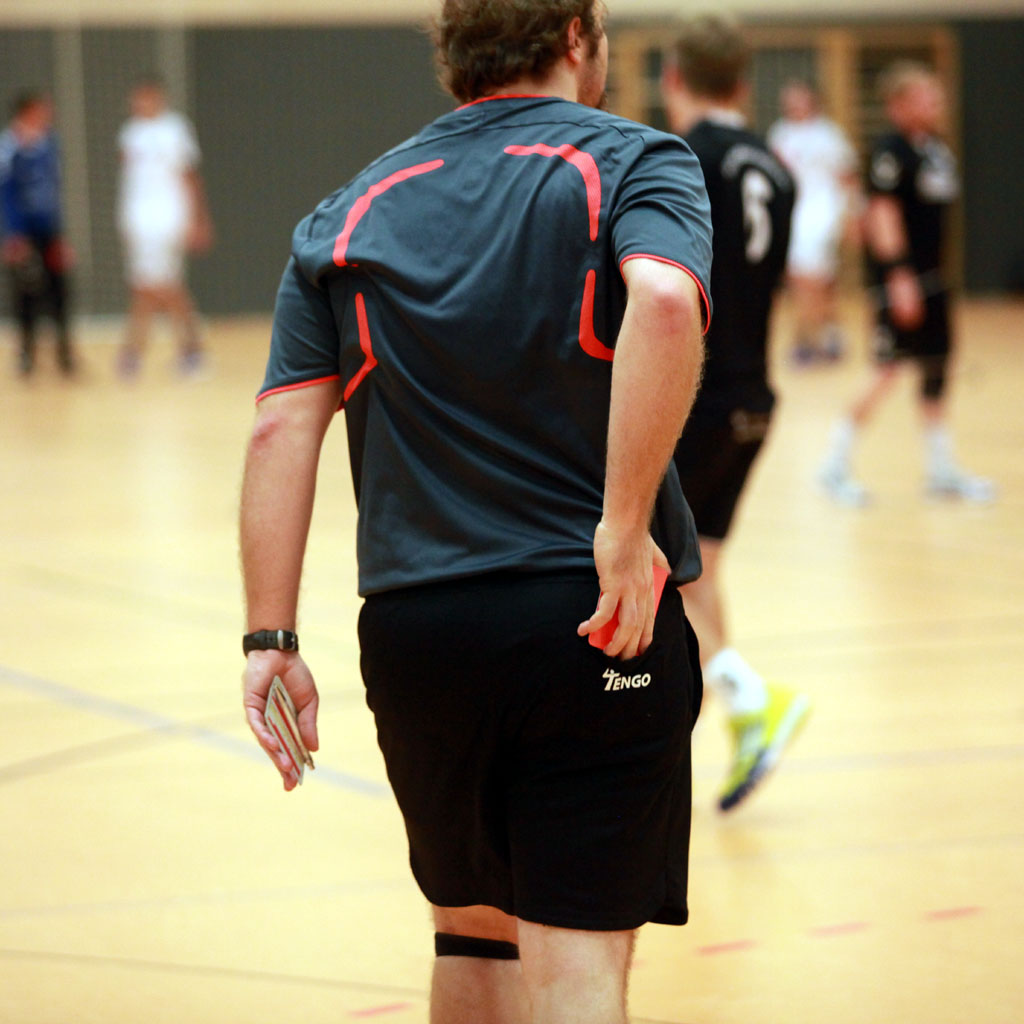 Ein Handballschiedsrichter verstaut die Rote Karte (=Arschkarte) in der Gesäßtasche. Aufgenommen am 4. Oktober 2012 beim Bezirksoberligaspiel im Handballbezirk Darmstadt, zwischen der ESG Crumstadt/Goddelau und dem TV Büttelborn.